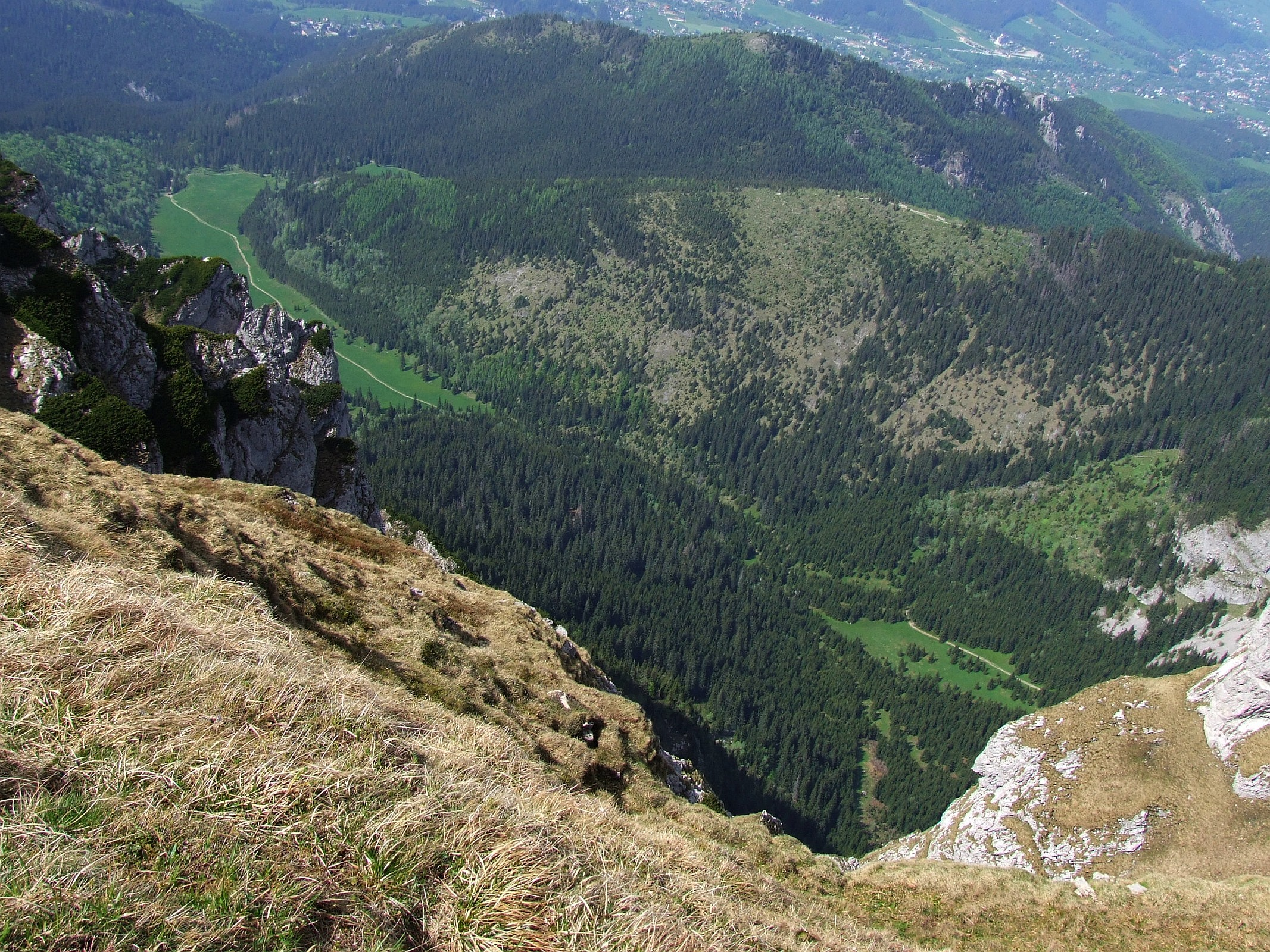 Dolina Małej Łąki, Grzybowiec i Łysanki. Widok z Czerwonego Grzbietu